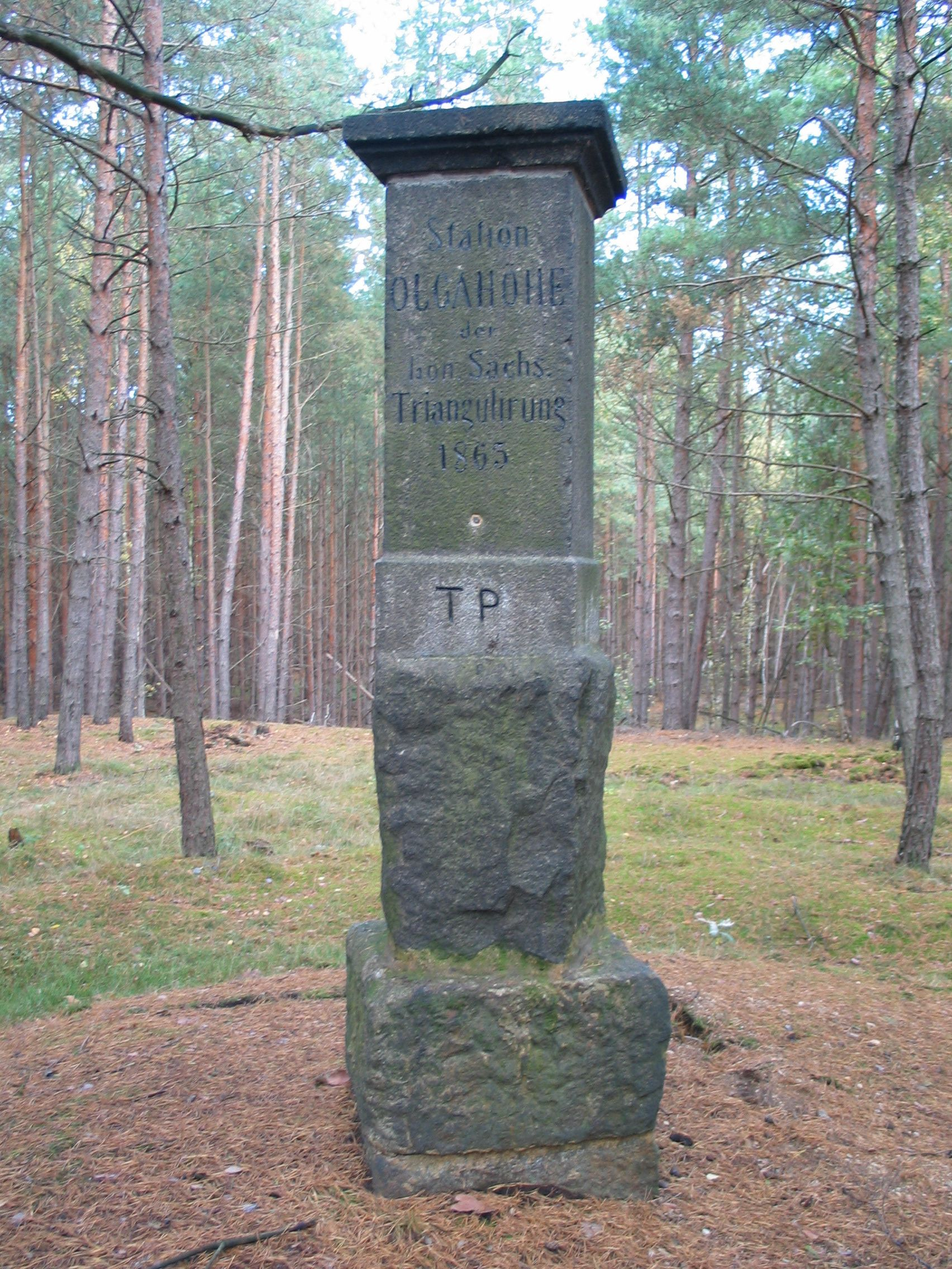 Trigonometrischer Punkt 2. Ordnung Nr. 67 der Königlich-Sächsischen Triangulierung